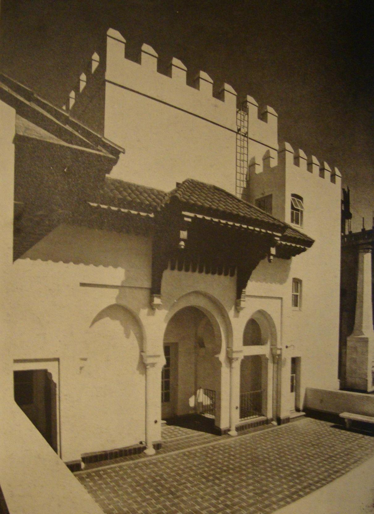 Vista de la terraza del Edificio Tornquist, del arquitecto Alejandro Bustillo. Sede del Banco Tornquist, actualmente en manos del Banco Santander Río, pero desocupado. Calle Bartolomé Mitre nº 527/531/559.